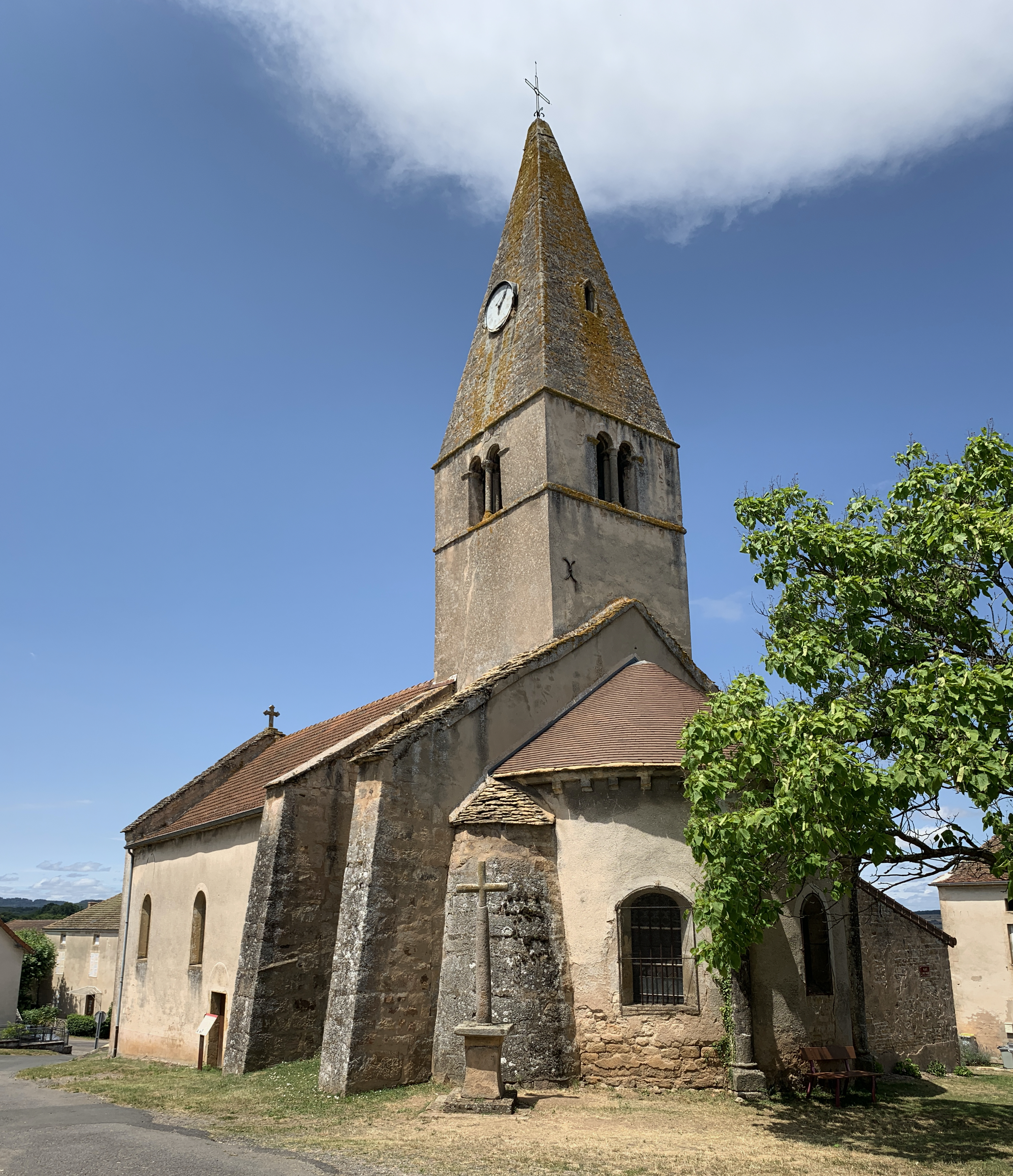 Église Sainte-Marie-Madeleine de Donzy-le-National, La Vineuse-sur-Fregande.